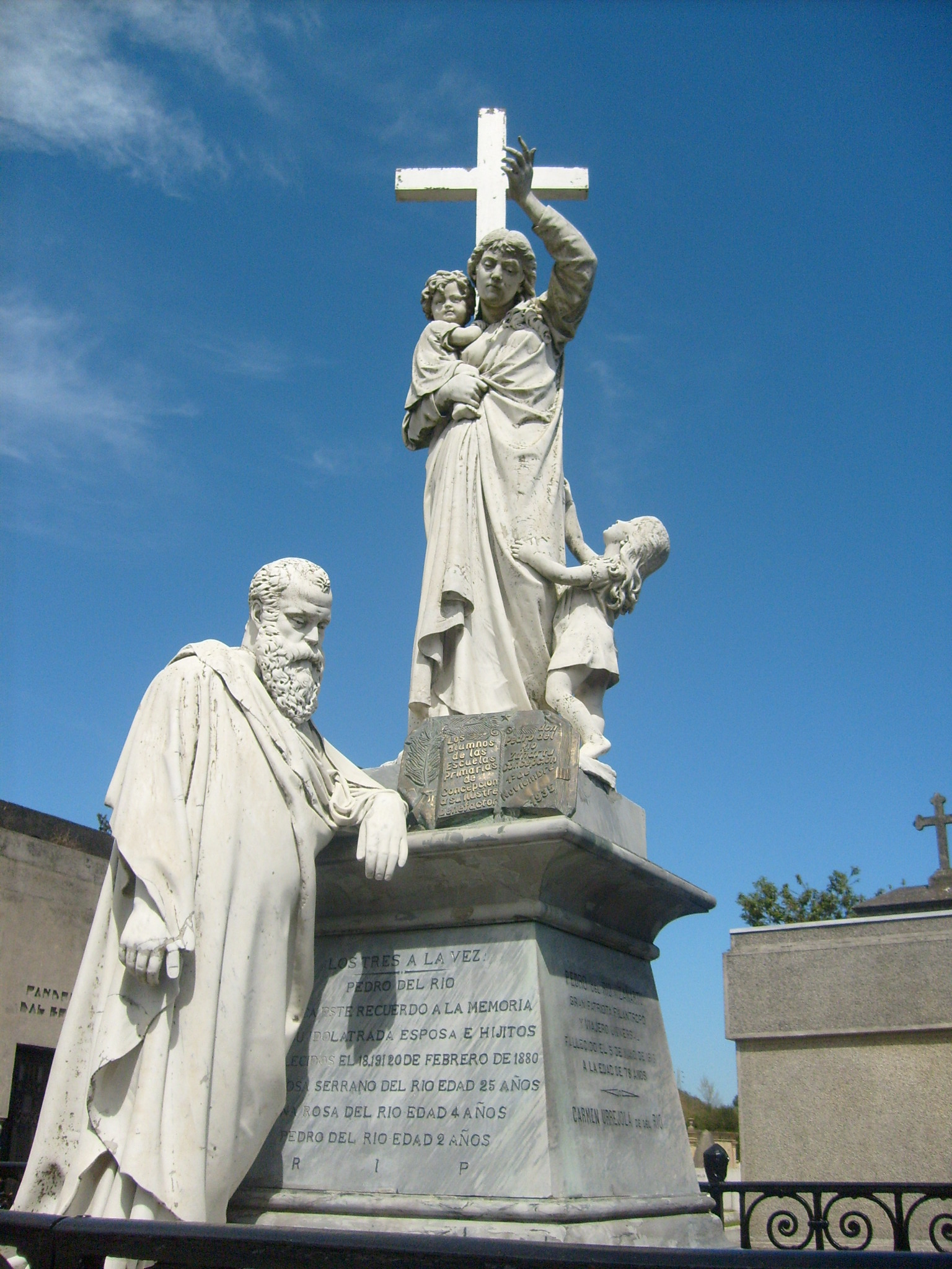 Esta es una vista de la escultura que decora la tumba de la familia de Pedro Del Río Zañartu en el Cementerio General de Concepción, Chile. La escultura retrata los sentimientos de don Pedro al morir casi simultáneamente su joven esposa y sus dos pequeños hijos. También se encuentra sepultada allí su segunda esposa.